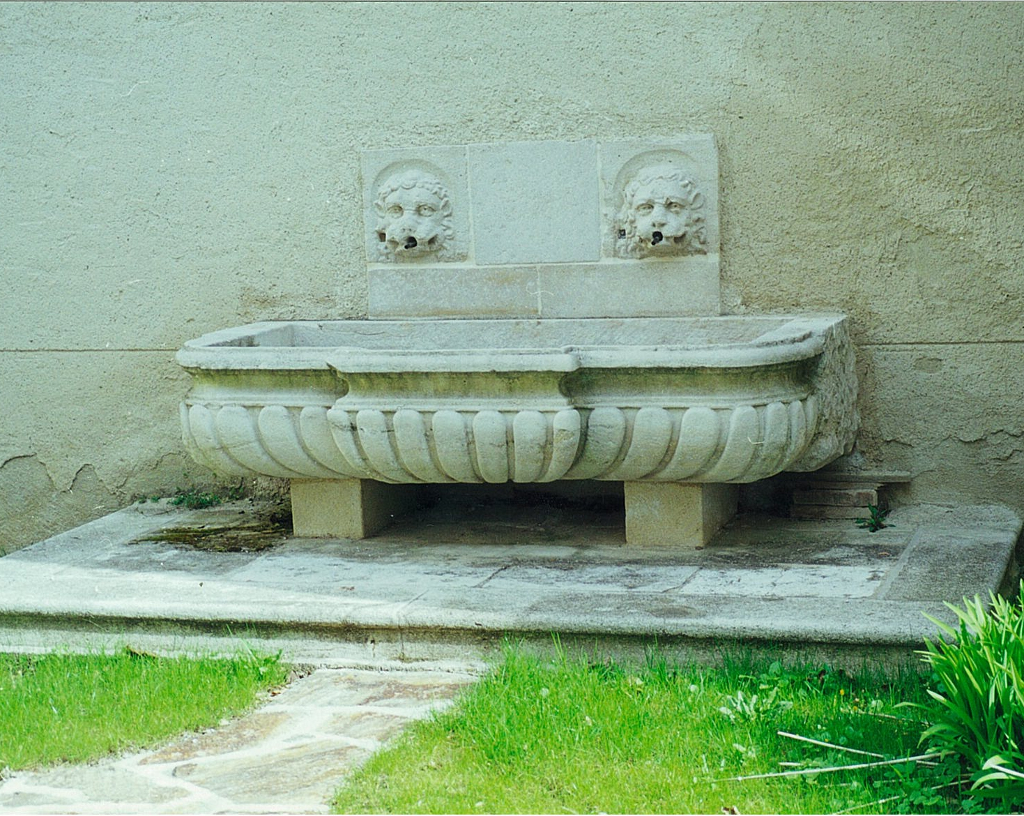 Brunnen im Sakristeihof, Stift Heiligenkreuz